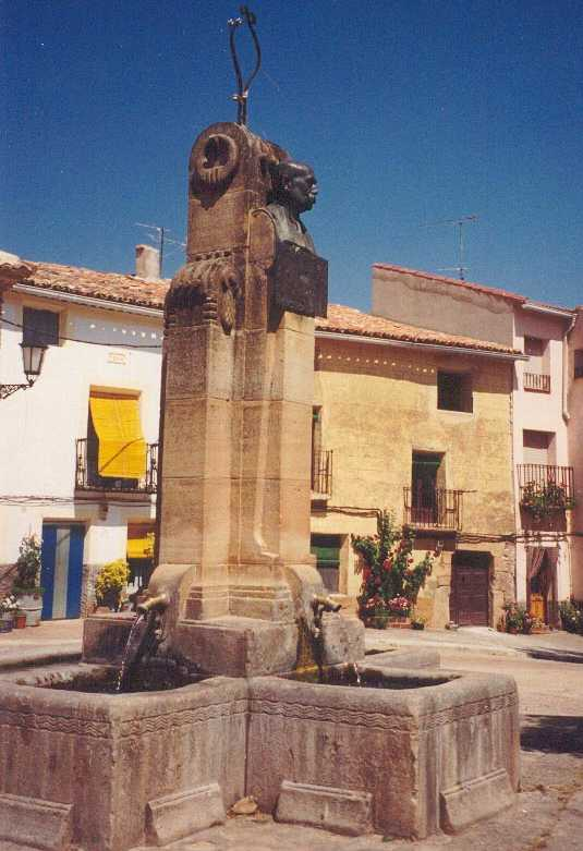 Fuente de Calixto Rodríguez en la plaza Mayor de Rillo de Gallo